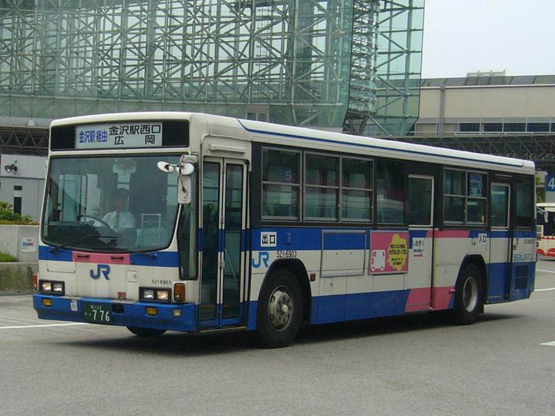 登録番号：石川22き・776 西日本JRバス所属